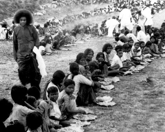 Sathya Sai Baba alimentado los pobres año 1948